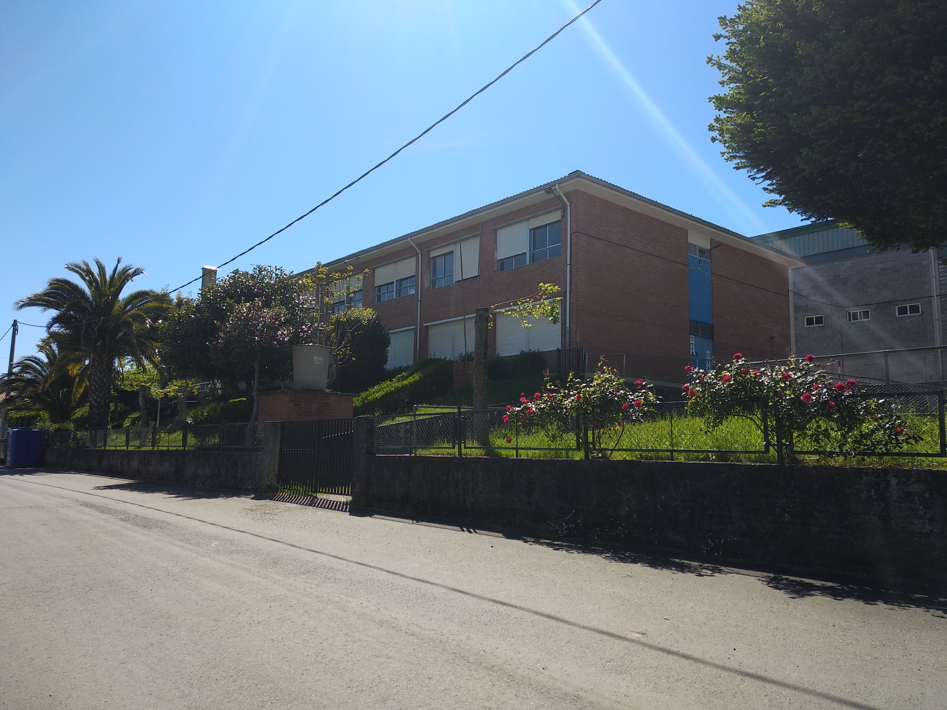 CEIP Plurilingüe Varela Buxán de Cercio